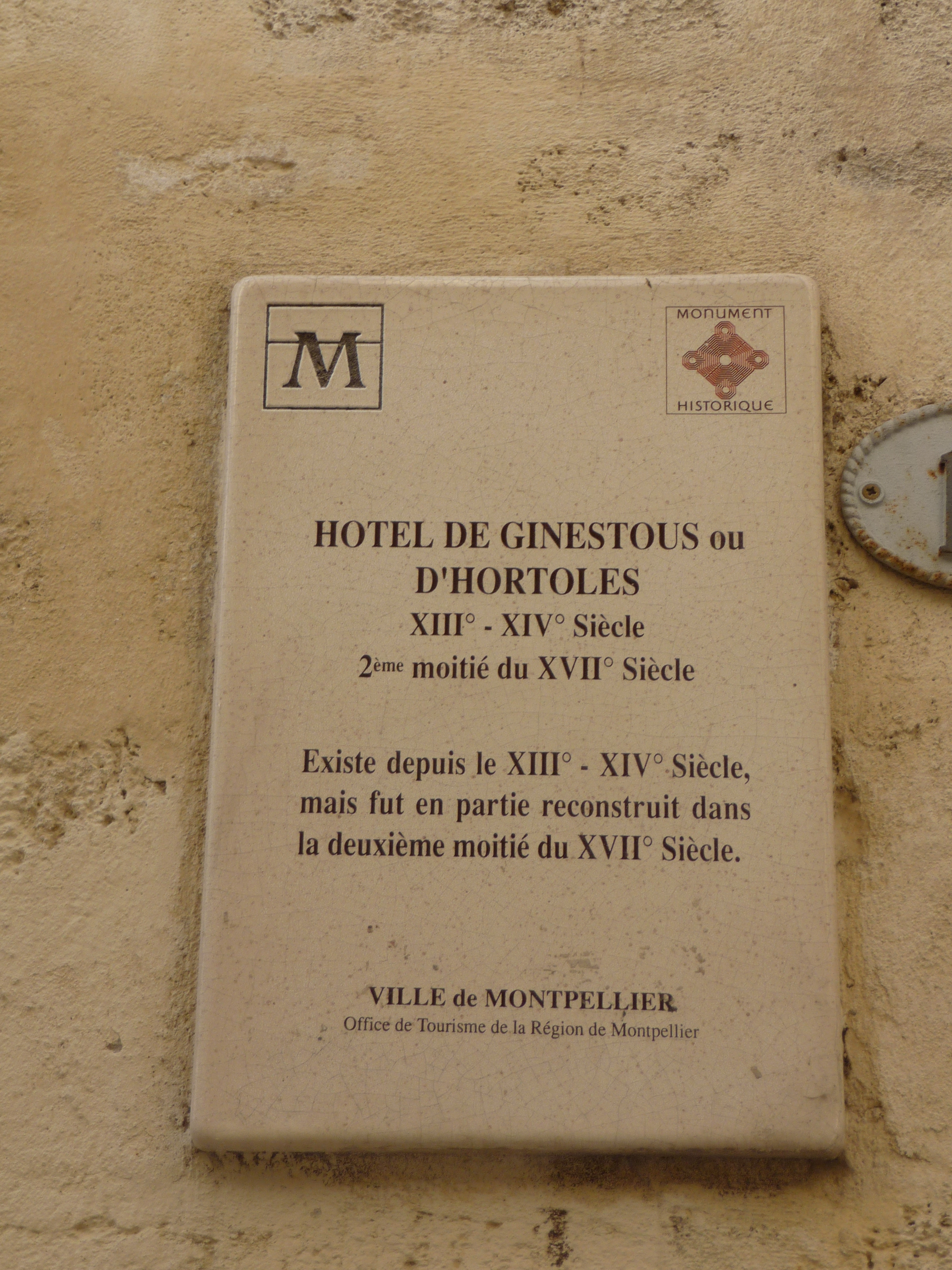 Hôtel Hortolès (Montpeller) .